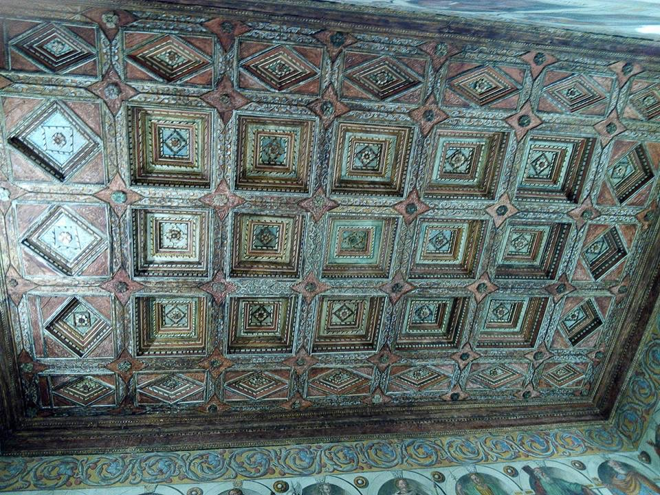 Decke des Kirchengebäudes Santissimo Salvatore, Cosenza